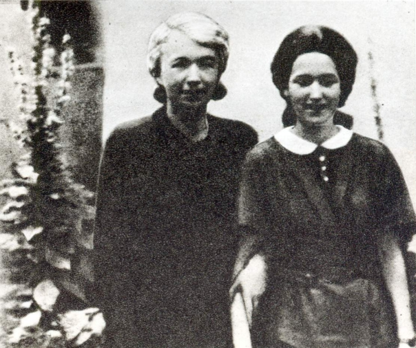 Teresa Bogusławska, polska poetka; uczestniczka powstania warszawskiego, „Najmłodsza Poetka Walczącej Warszawy”. Ostatnie znane zdjęcie, Teresa (po lewej) z matką Marią Bogusławską, rok 1944.